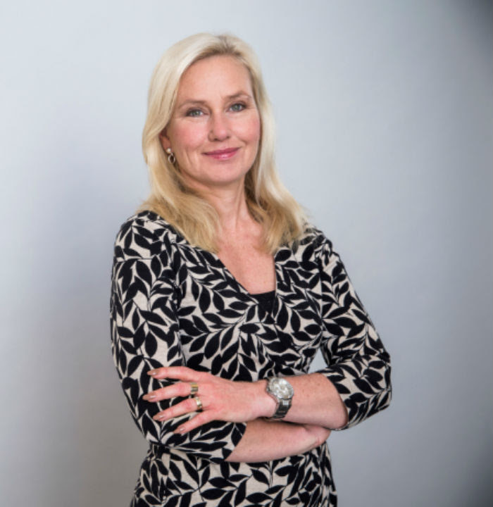 Infrastrukturminister Anna Johansson (S). Statsrådet bär ett armbandsur av märket Guess, "Prism Silver Dial Bracelet I14503L1"